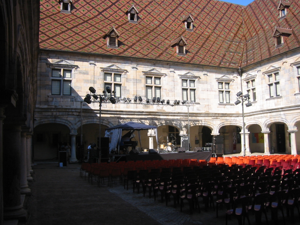 Cour intérieure du Palais Grandvelle et du Musée du Temps de Besançon